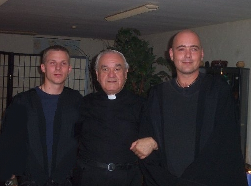 Foto der Investitur und des ersten Chevaliereides in der SoU